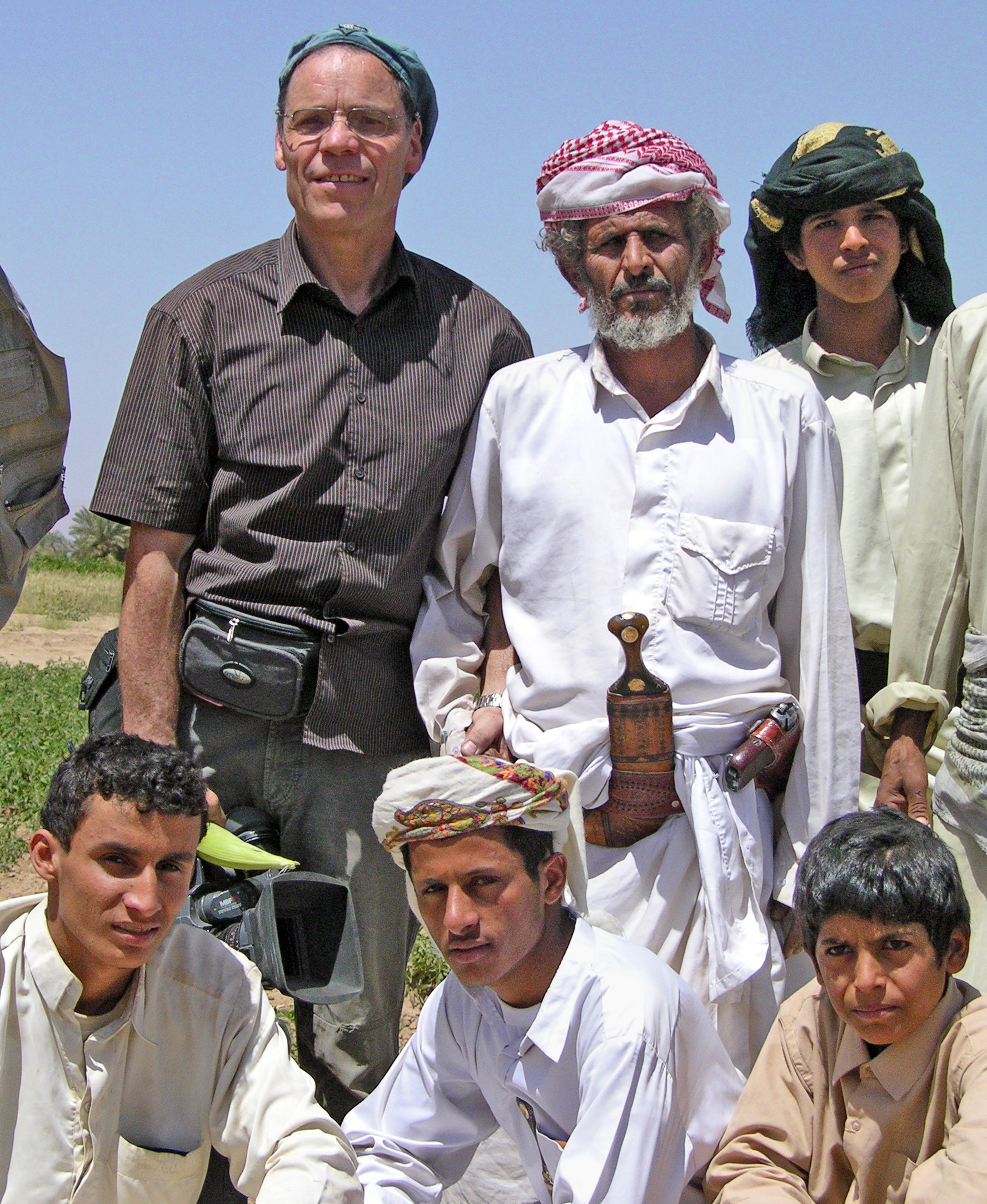 2007 Rainer Komers in Ma'rib inmitten einer Gruppe von 5 Beduinen